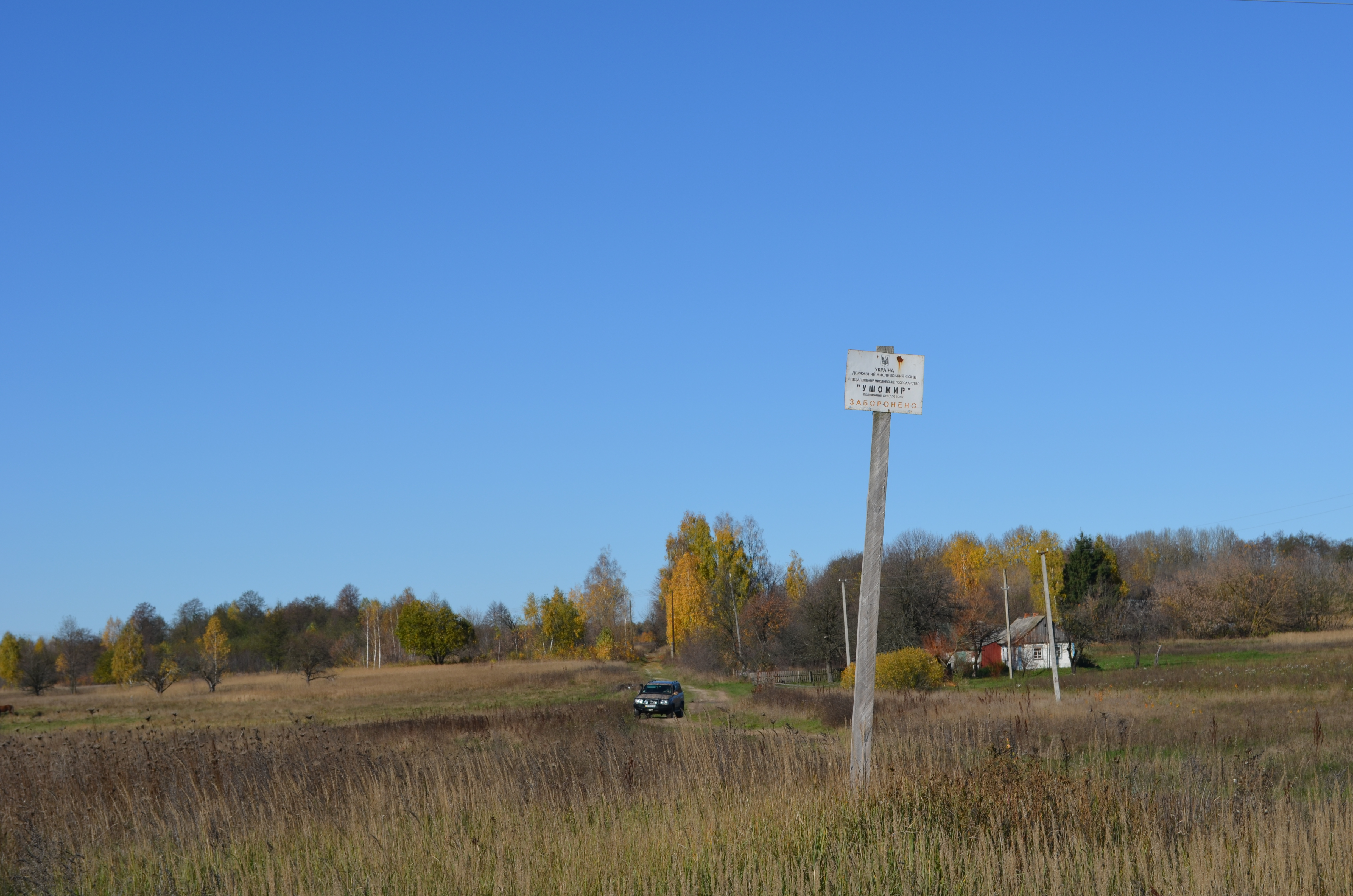 с. Зарубинка